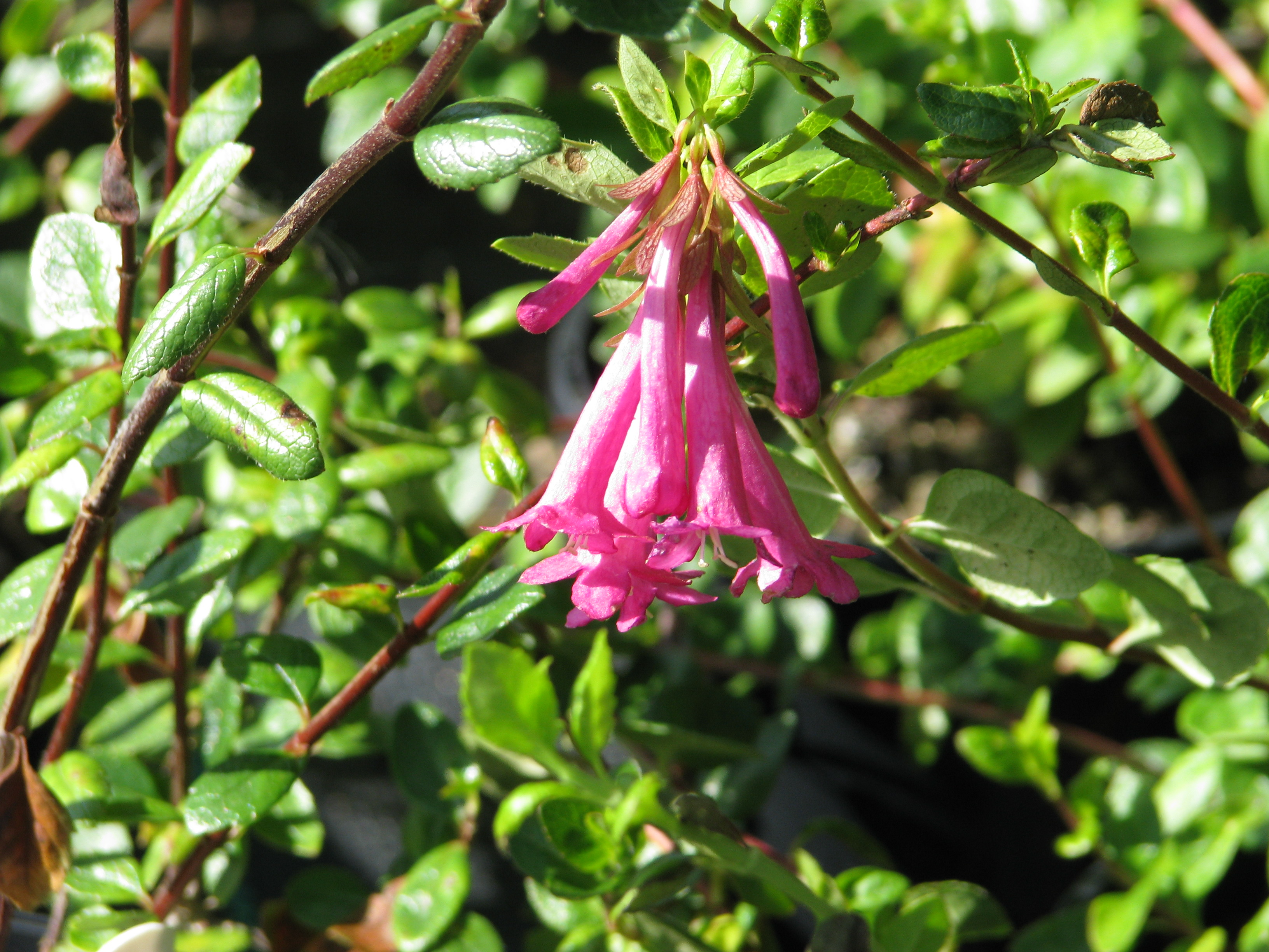 Abelia (Vaselea) floribunda